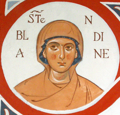 Святая мученица Бландина Лионская. Фреска из православной Успенской церкви иконописного ателье святого Иоанна Дамаскина в департаменте Дром (Франция).